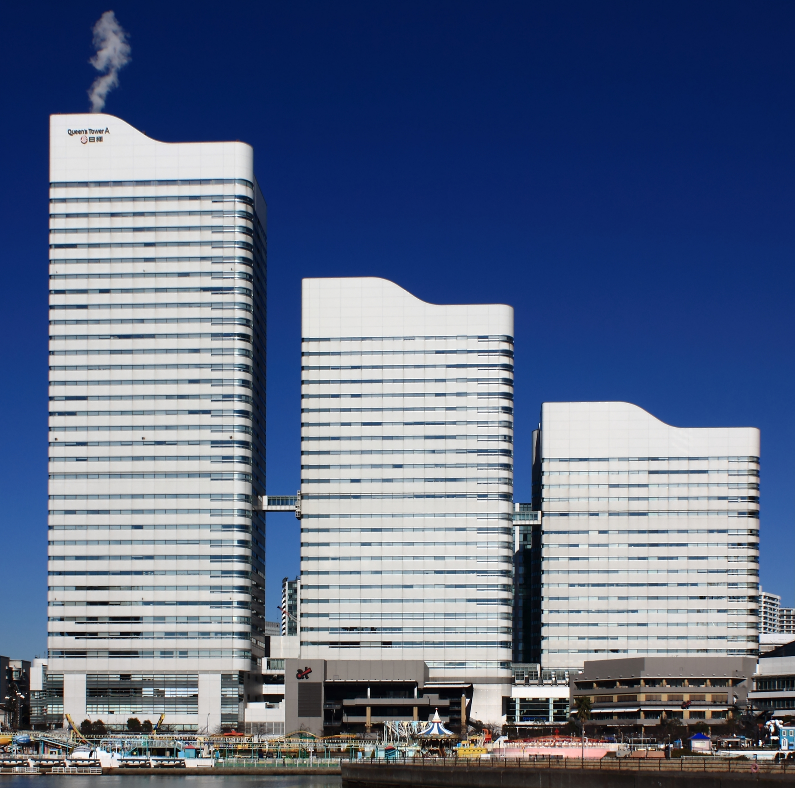 Queens Square Yokohama